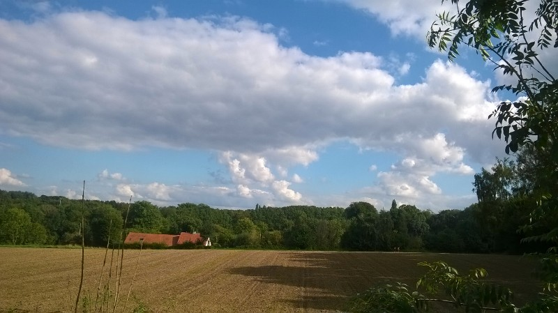 Landschap 'de Helle'